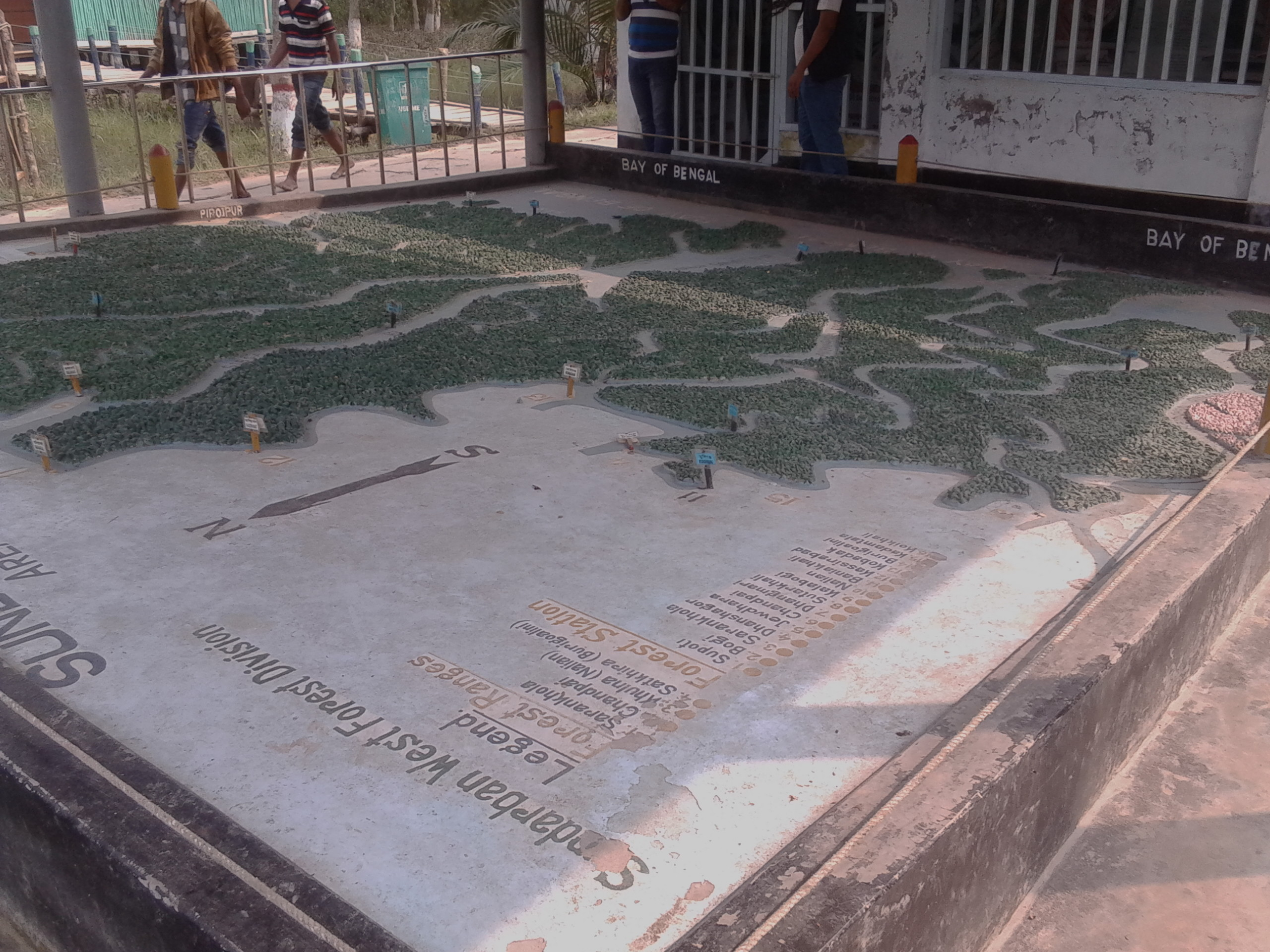 সুন্দরবনের প্রবেশদ্বারে তৈরিকৃত মানচিত্র